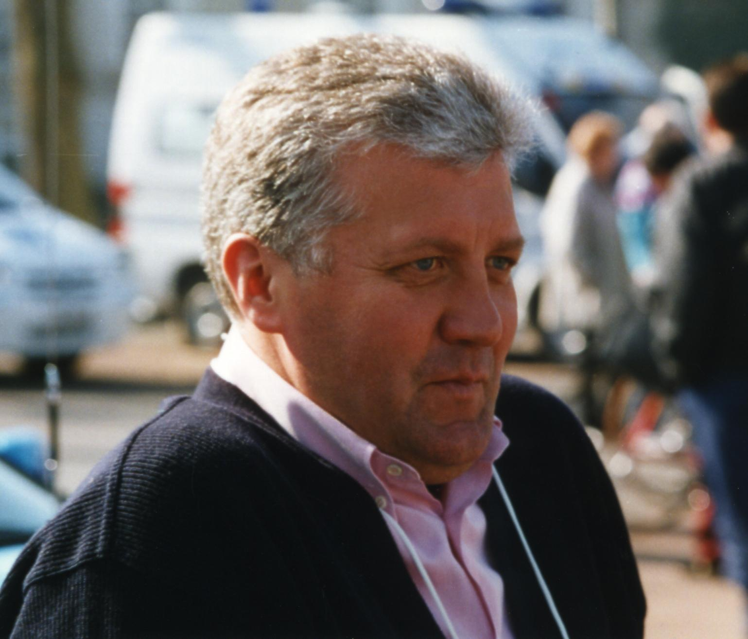 PARIS-NICE 1997